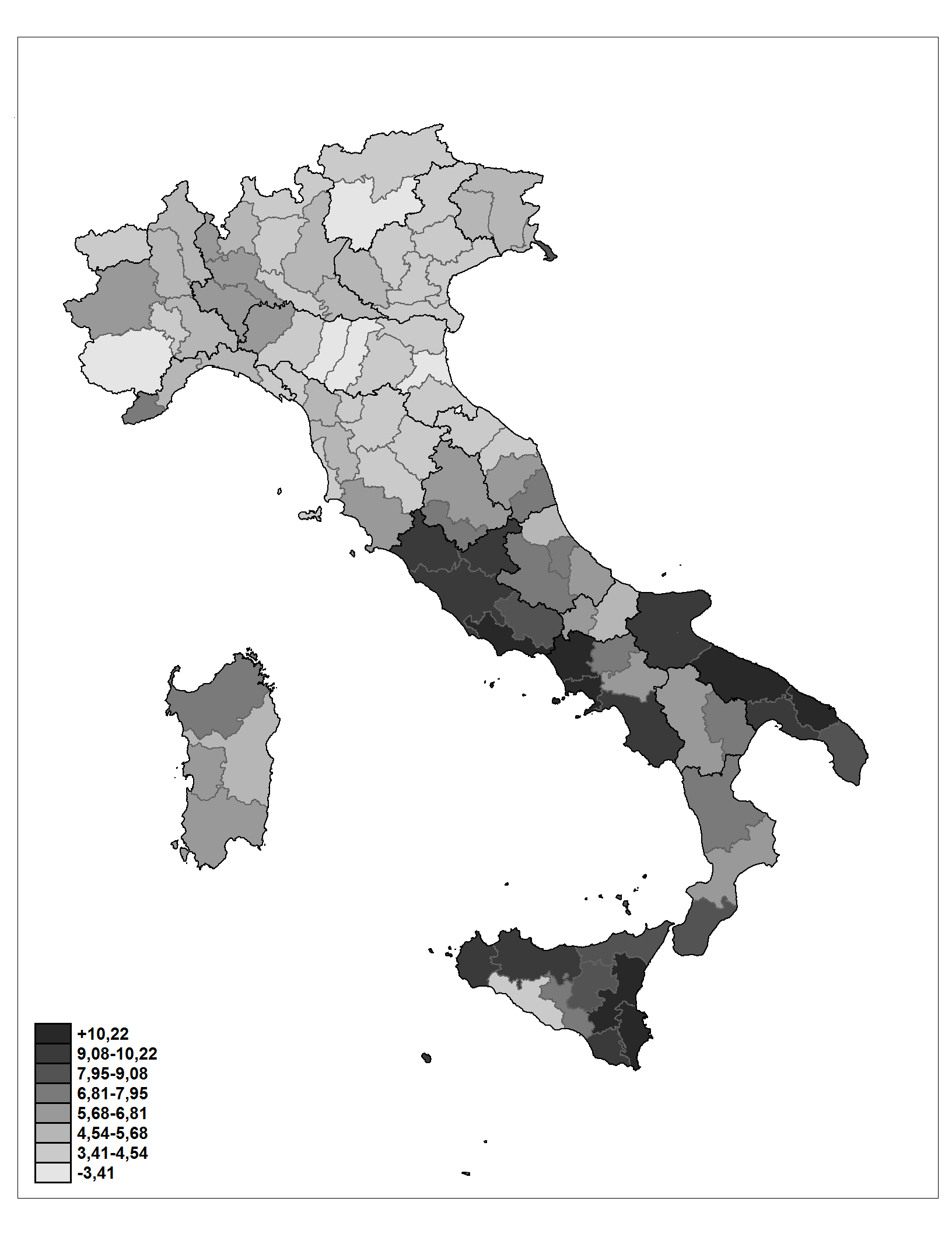 Distribuzione del voto al MSI nelle elezioni politiche del 1983.